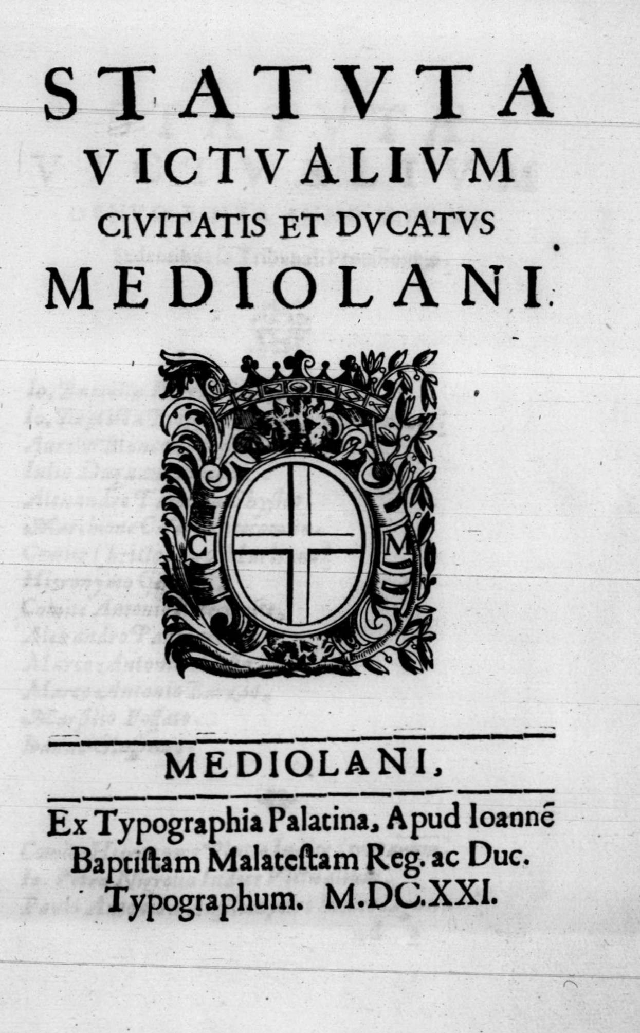 Frontespizio